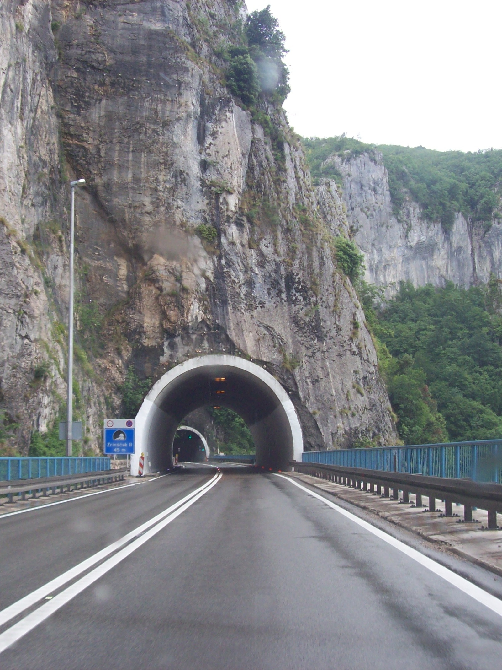 Učka tunnel - Zrinšćak II tunnel, west entry